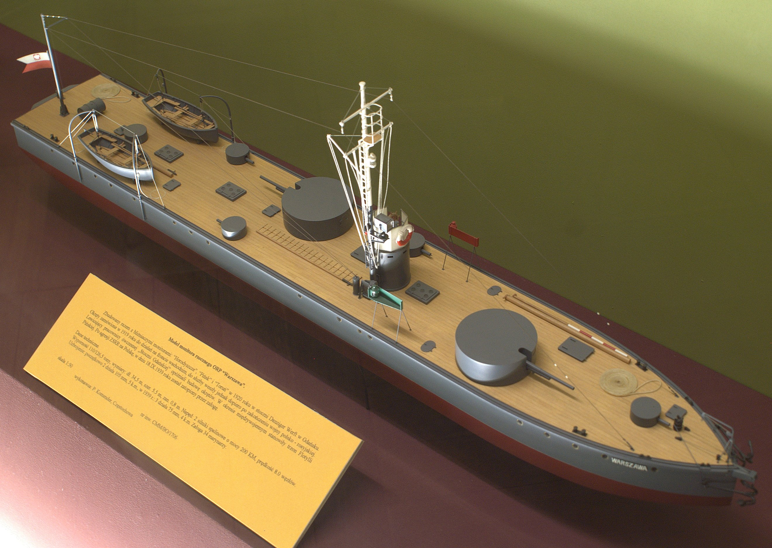 Model monitora rzecznego ORP Warszawa (1920) w skali 1:50, wykonany przez P. Komender